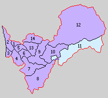 秋田県河辺郡の町村。